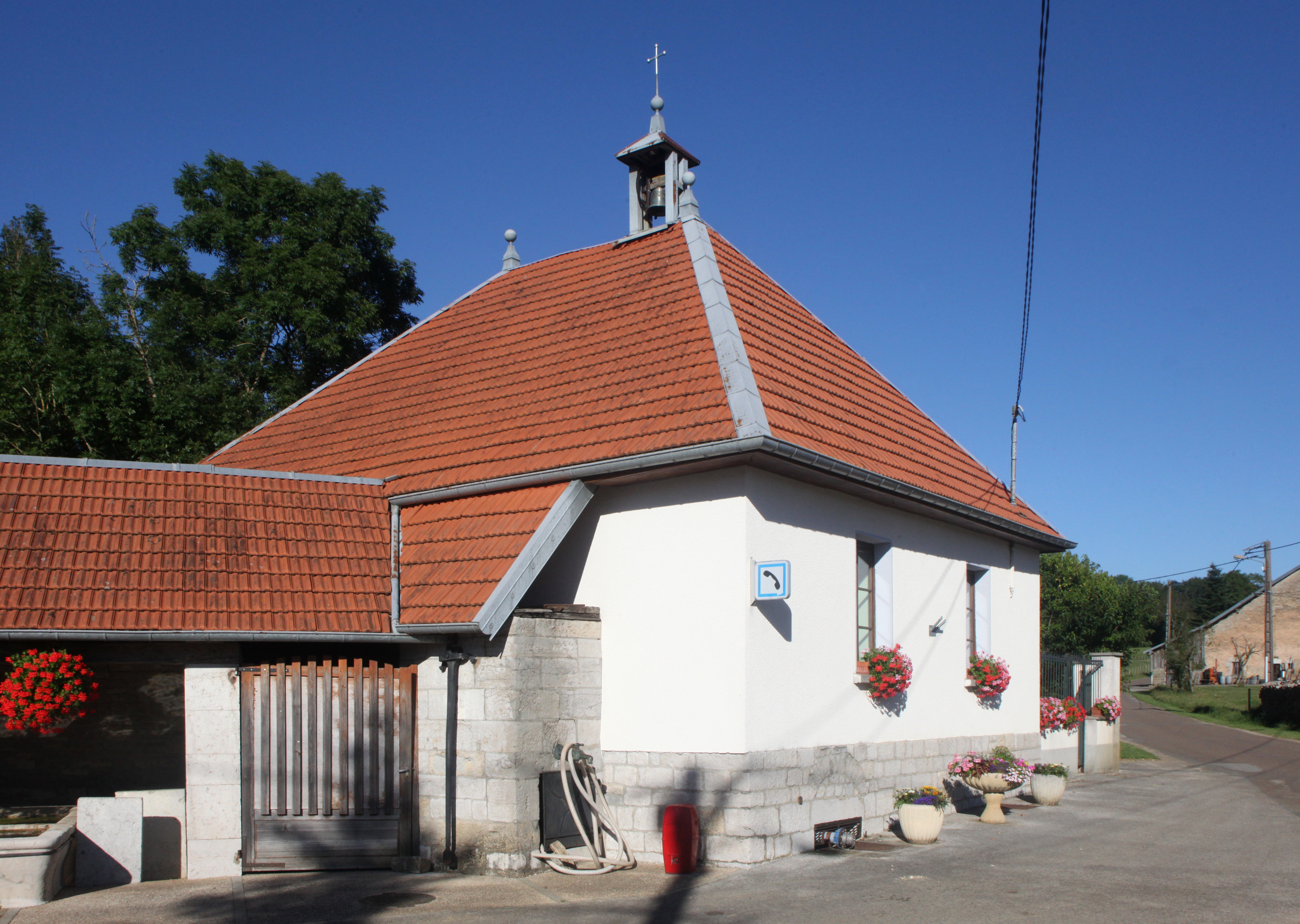 Mairie de Magny-Chatelard (Doubs).